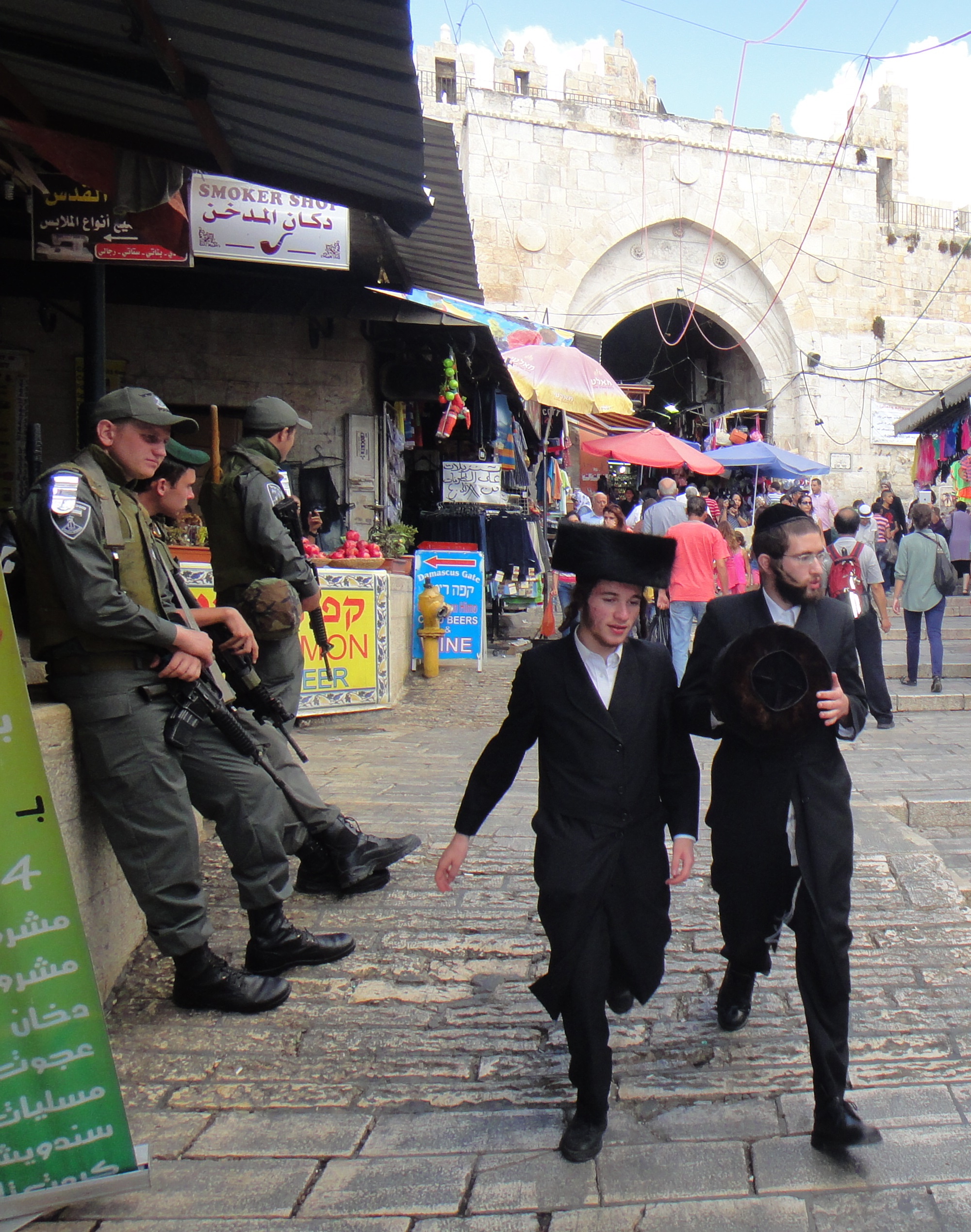 שער שכם